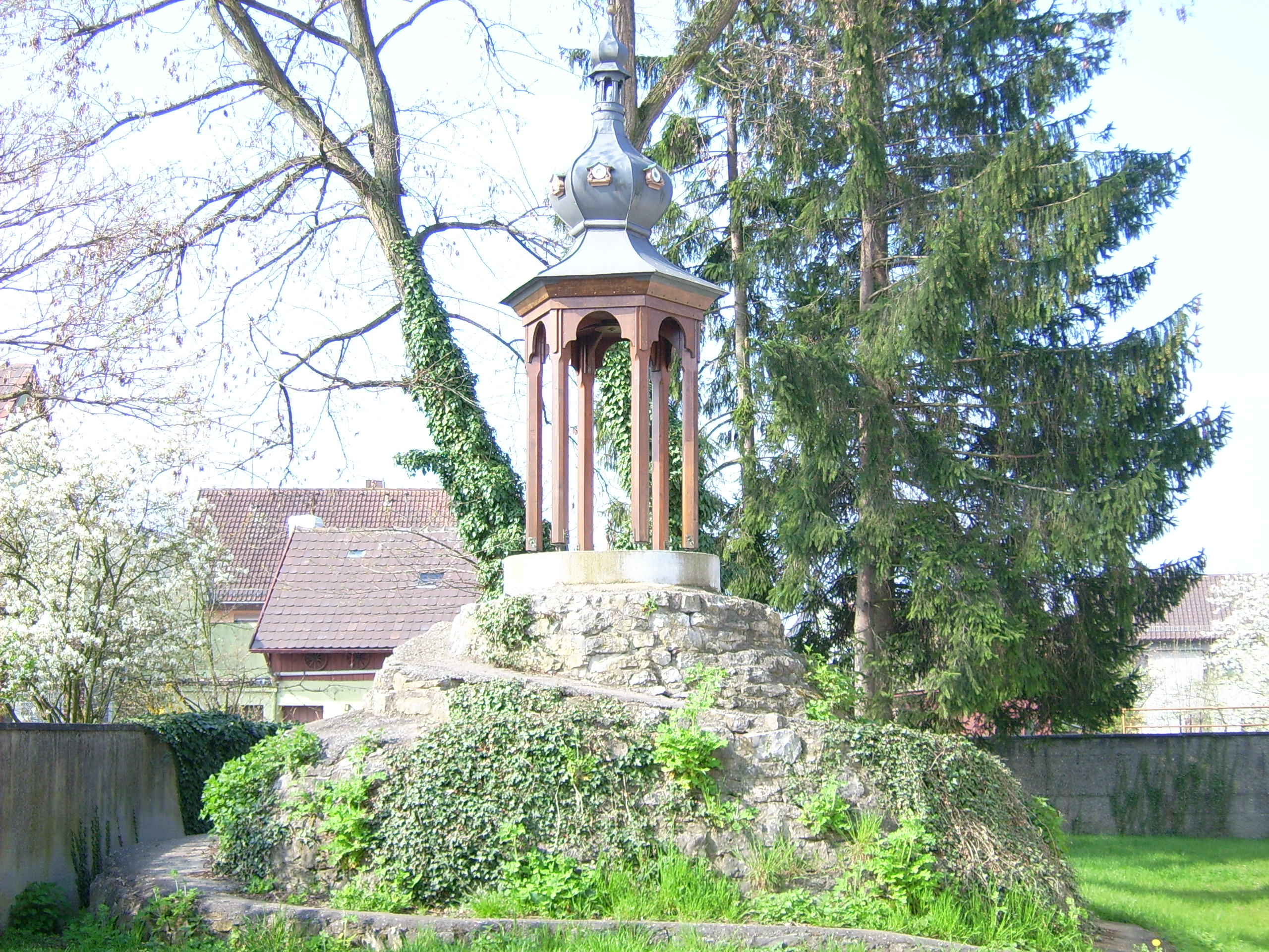 Nachbildung des alten Kirchturmdaches von Büchenau